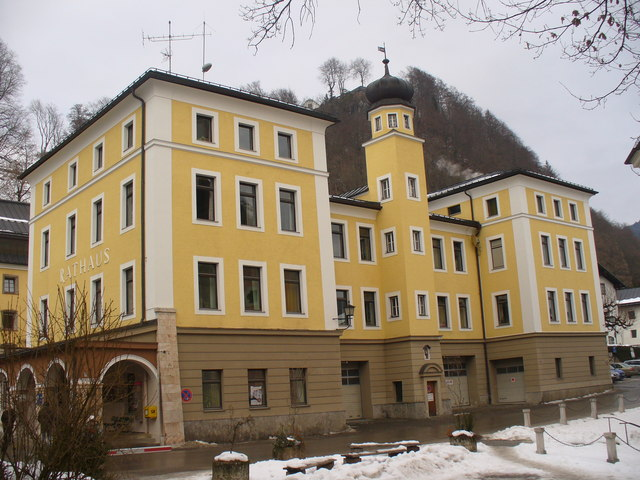 Rathaus, Berchtesgaden (Town Hall, Berchtesgaden)